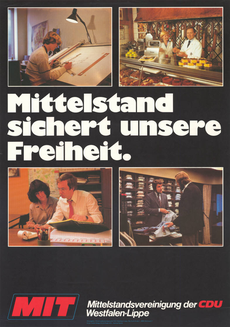 Mittelstand sichert unsere Freiheit. MIT Mittelstandsvereinigung der CDU Westfalen-Lippe Abbildung: Fotocollage Plakatart: Motiv-/Textplakat Auftraggeber: Mittelstandsvereinigung der CDU Westfalen-Lippe, Dortmund Drucker_Druckart_Druckort: Grafik-Design Enk & Posse oHG., Castrop-Rauxel Objekt-Signatur: 10-031 : 10502 Bestand: CDU-Plakate (10-031) GliederungBestand10-18: CDU-Plakate (10-031) » Mittelstandsvereinigung Lizenz: KAS/ACDP 10-031 : 10502 CC-BY-SA 3.0 DE